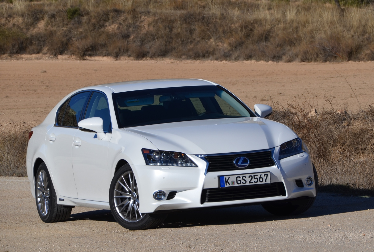 Lexus GS 300h